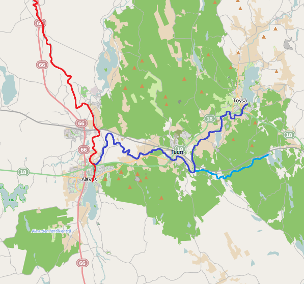 Kartassa Töysänjoki sinisellä,laskujoki Lapuanjoki punaisella ja sivuhaara Hakojoki vaaleansinisellä. This map may be incomplete, and may contain errors. Don't rely solely on it for navigation.